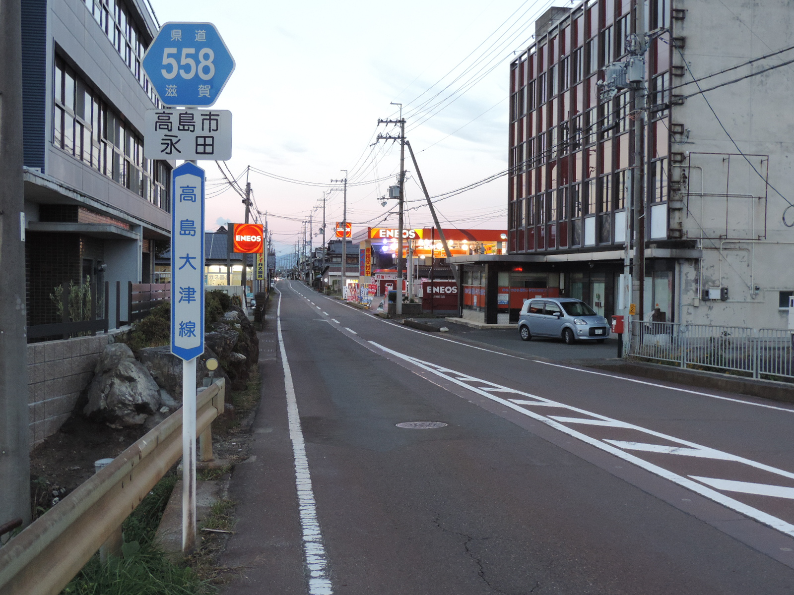 滋賀県道558号高島大津線。高島市永田にて。2017年撮影